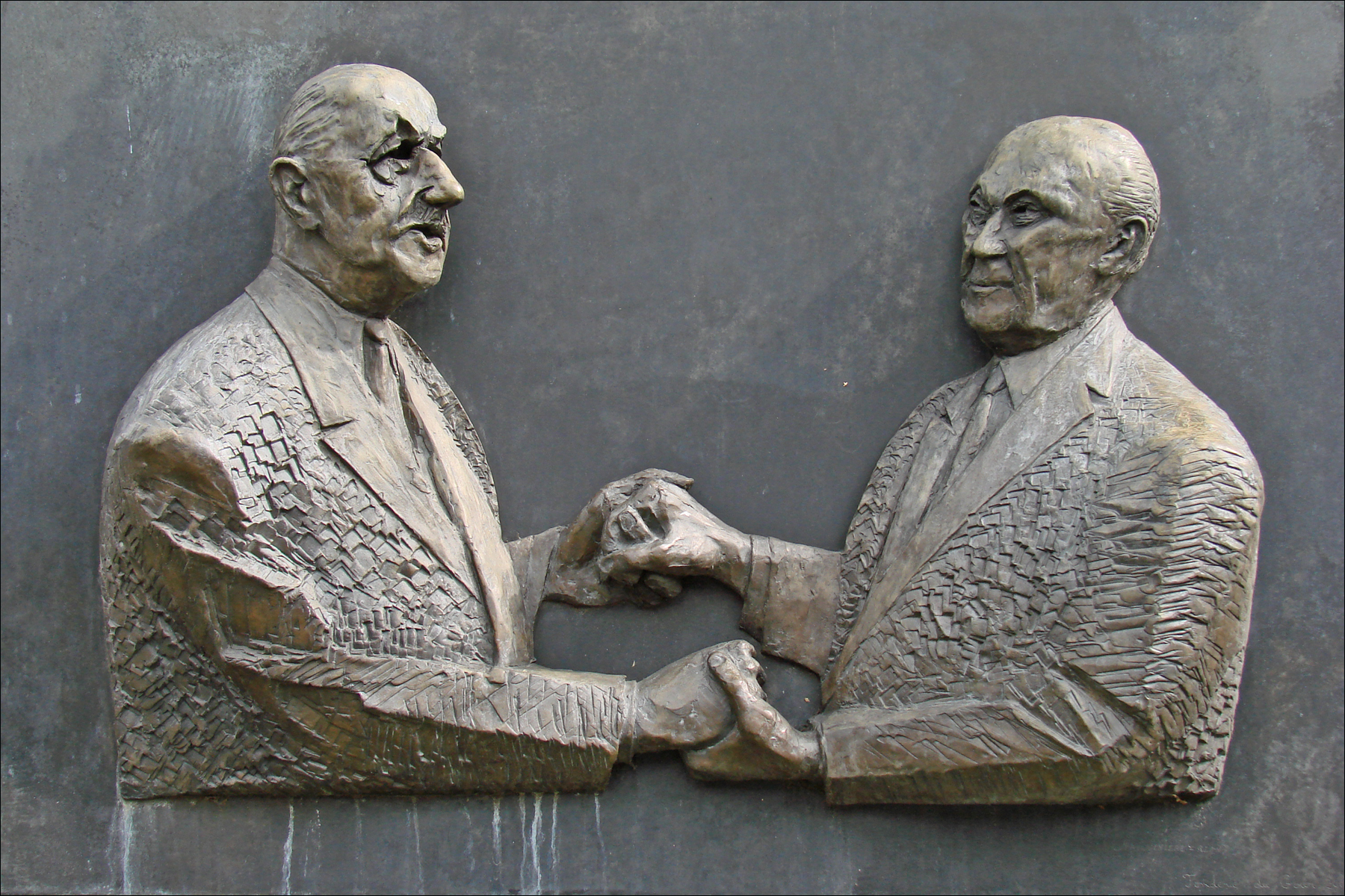 Plaque commémorant la Déclaration relative au Traité sur la coopération franco-allemande. Charles de Gaulle et Konrad Adenauer, 22 janvier 1963, Paris